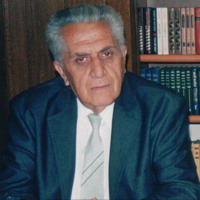 Ալեքսանդր Անդրանիկի Թալալյան